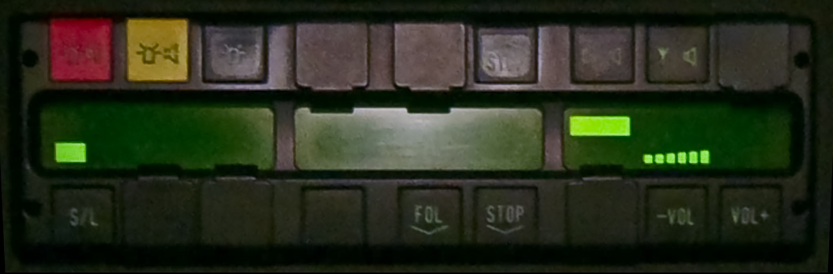 Bedienungseinheit eines Anhaltesignalgebers in einem deutschen Polizei-Einsatzfahrzeug